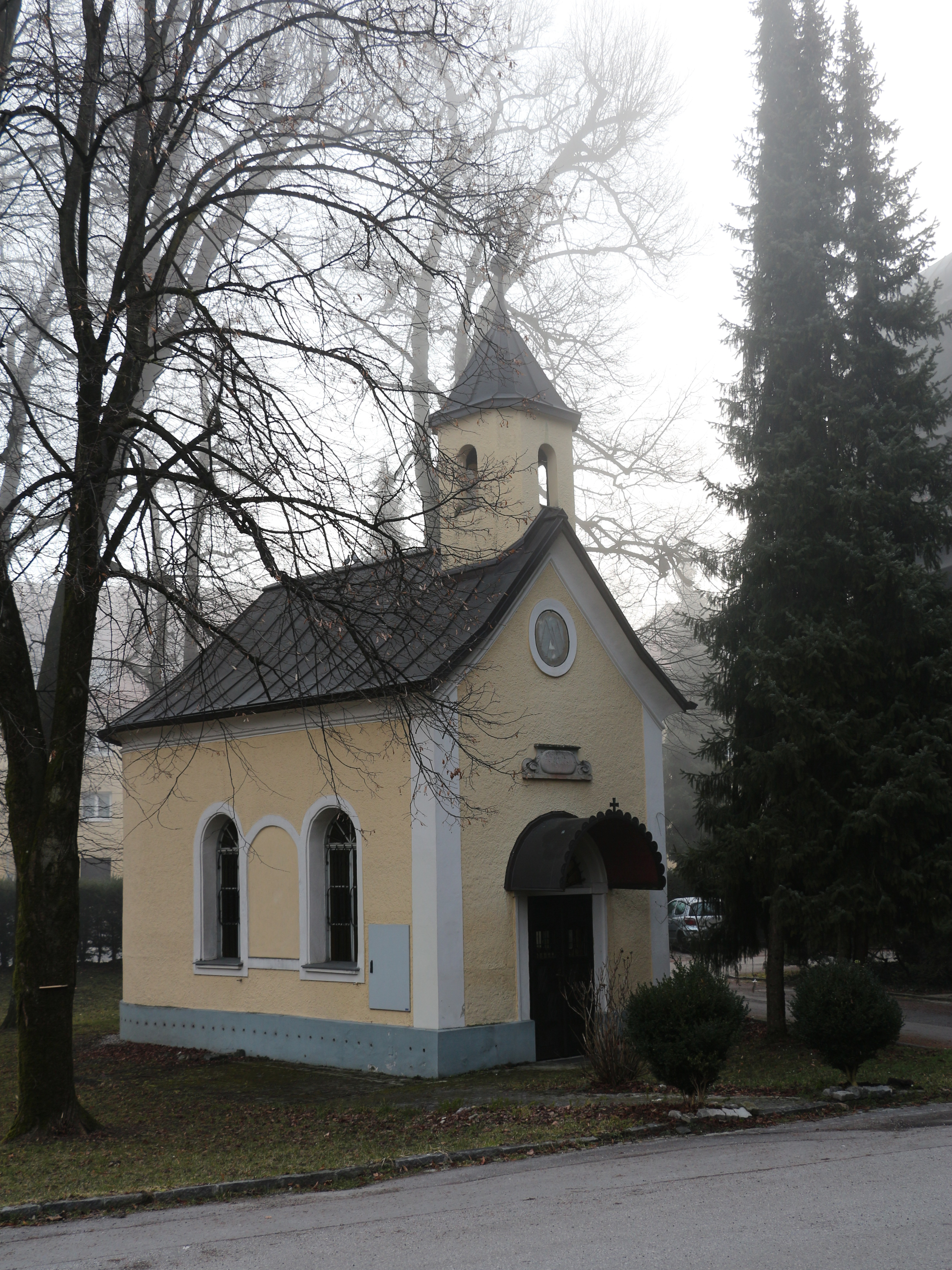 Philomena-Kapelle im Salzburger Stadtteil Liefering